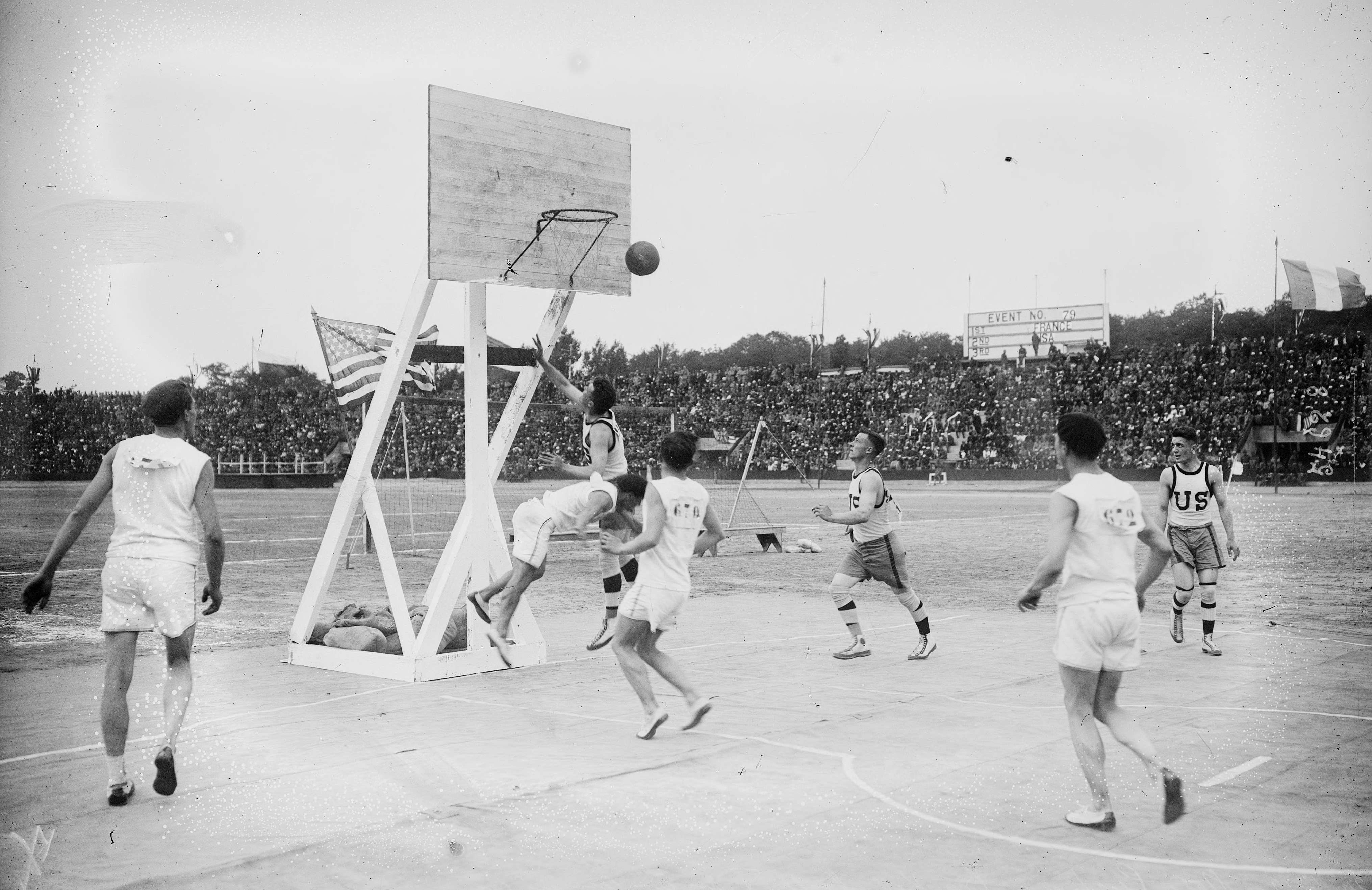 Victoire 93 à 8 des États-Unis sur la France lors des Jeux Interralliés de 1919 au stade Pershing